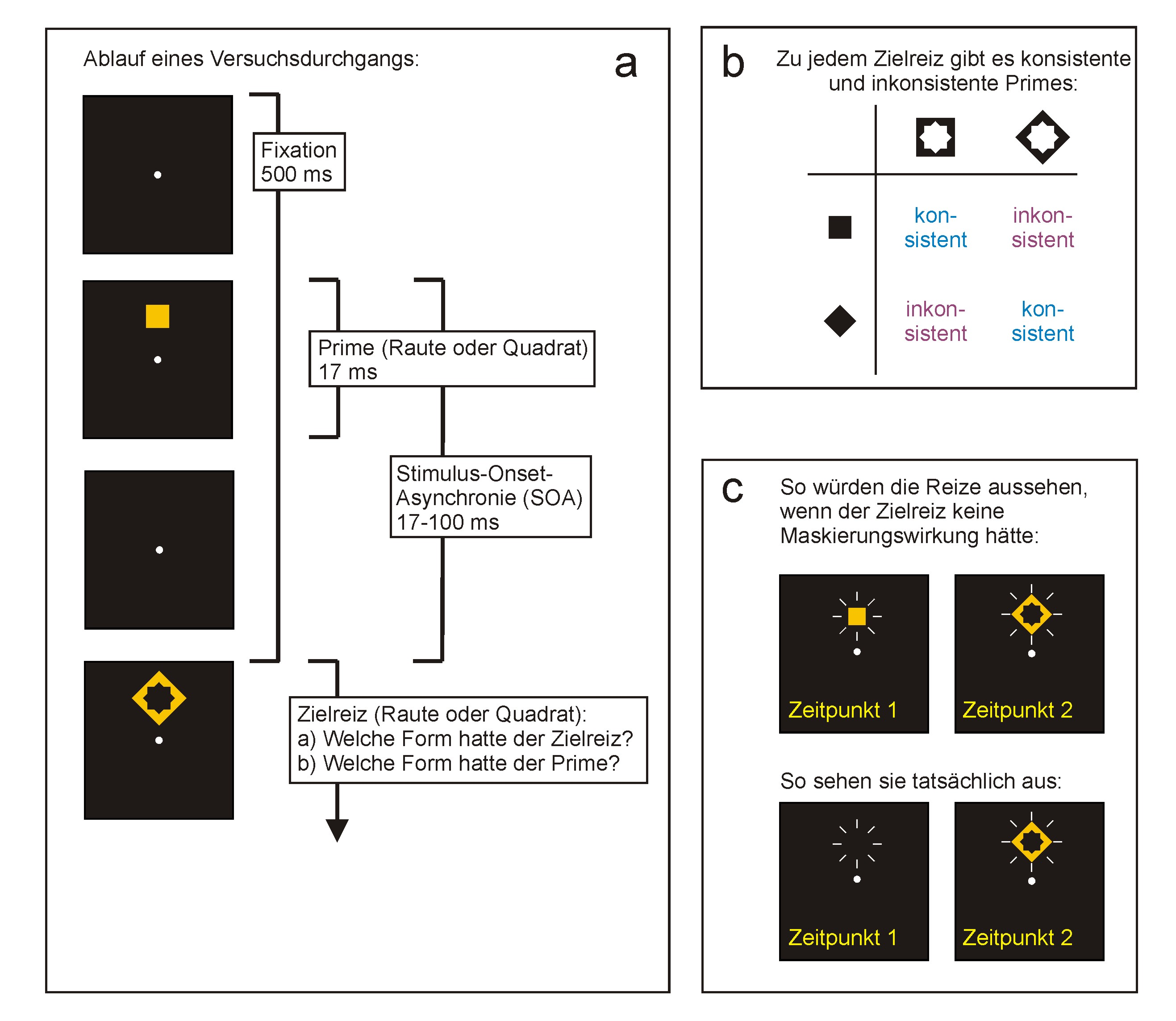 a) Ablauf eines Priming-Durchgangs b) Konsistente vs. inkonsistente Primes c) Maskierung